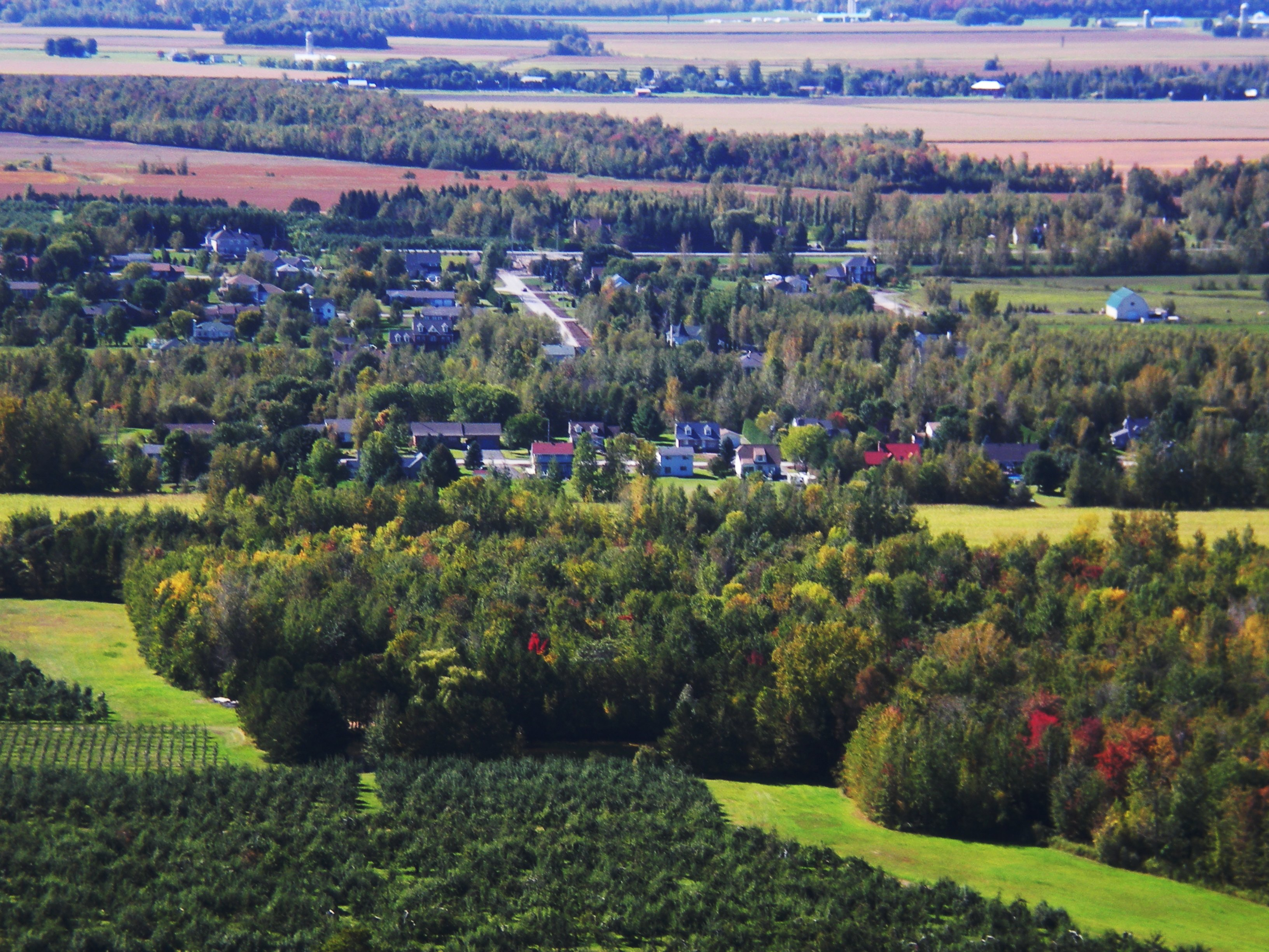 Ville de St-Grégoire vu de la montagne